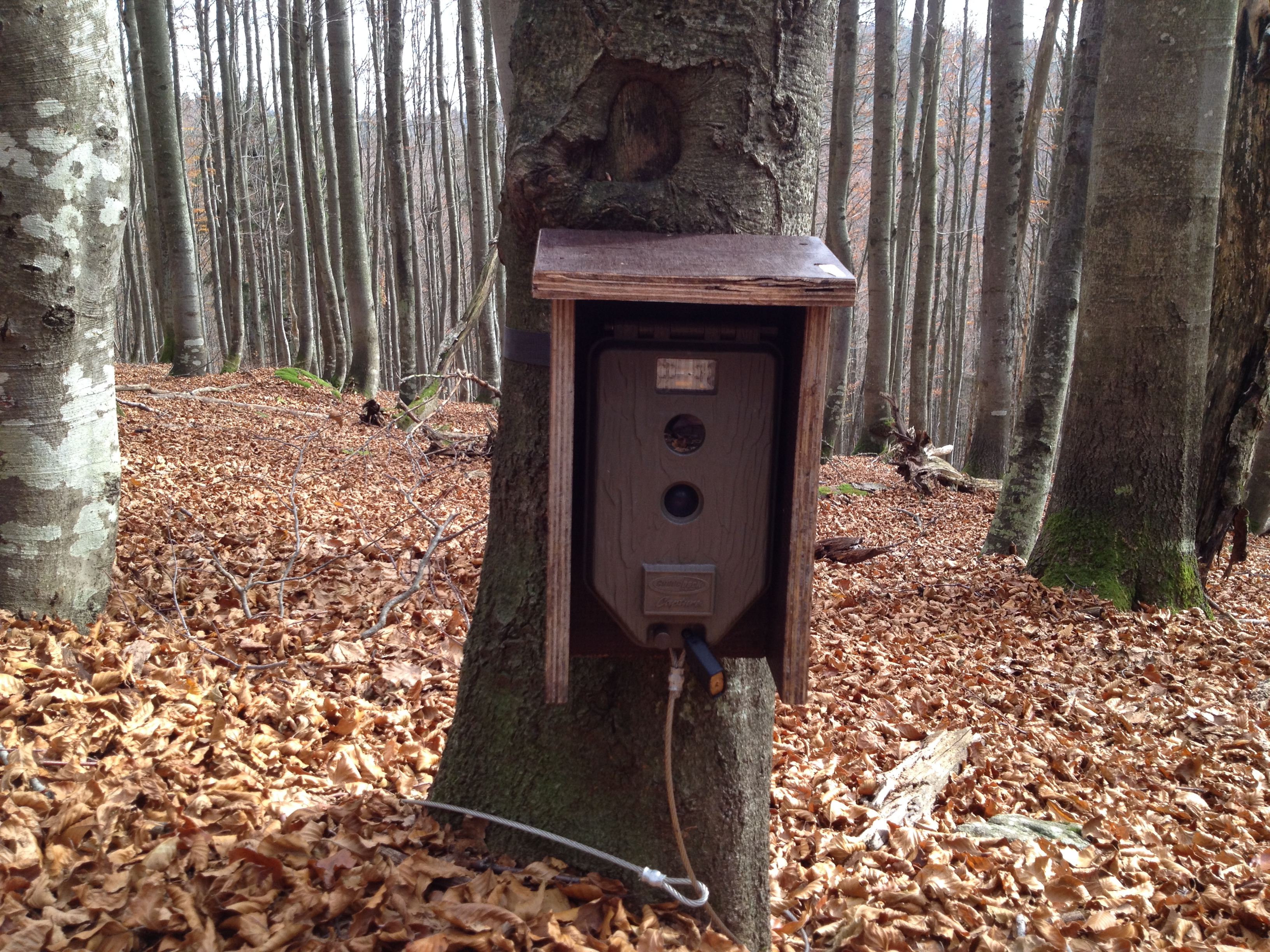 Wildkamera für Luchse am Lusen